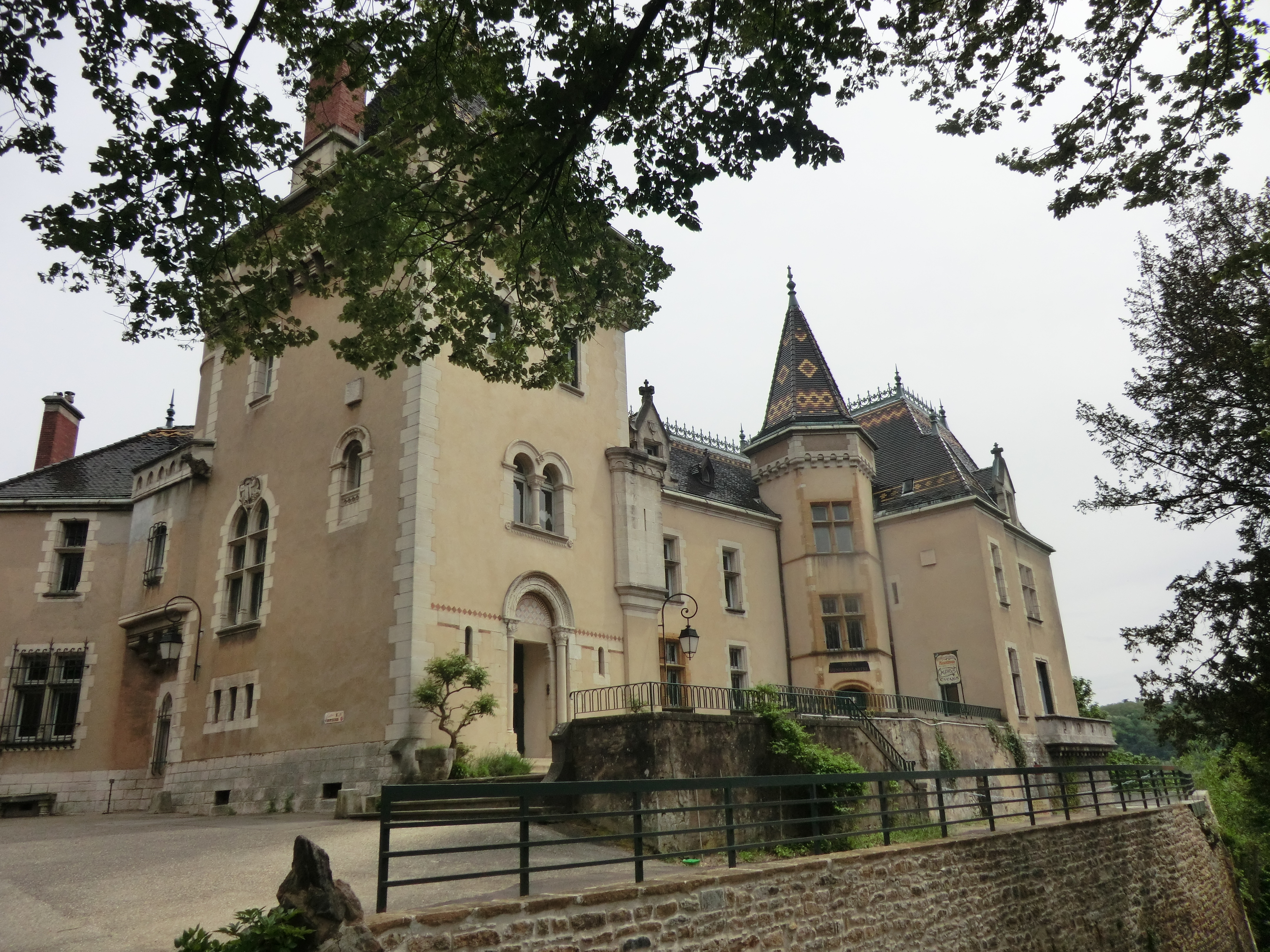 Château de Rochetaillée-sur-Saône